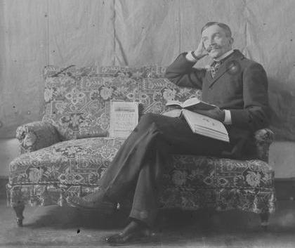 portret Karola Potkańskiego, ze zbiorów Muzeum Tatrzańskiego im. Dra Tytusa Chałubińskiego w Zakopanem